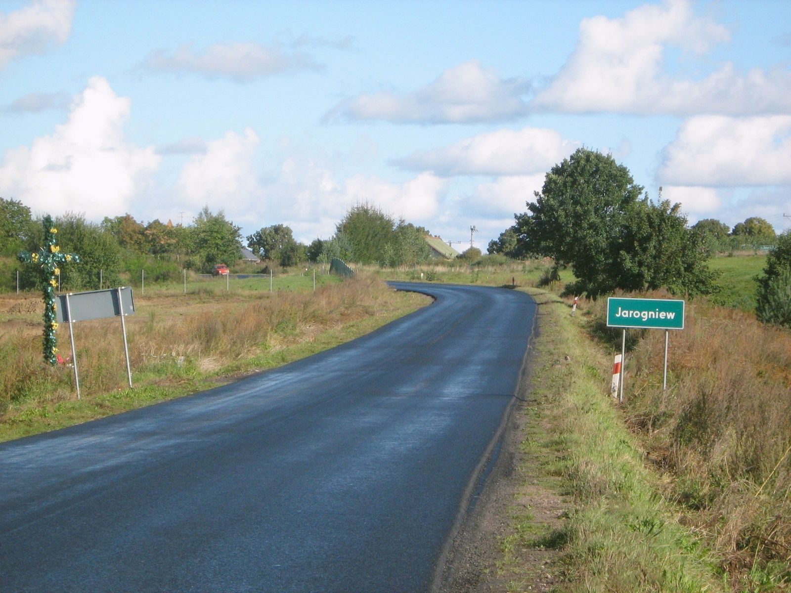 Droga nr 162 między Gościnem a Jarogniewem.